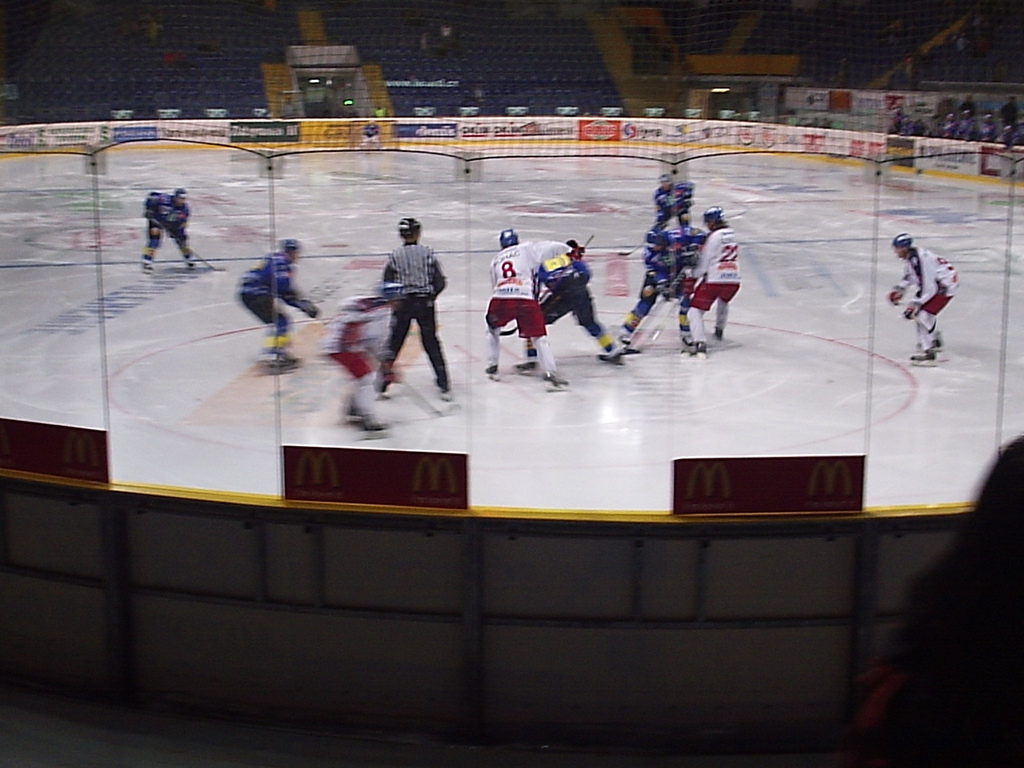 HC Slovan Ústečtí Lvi - Sareza Ostrava, Czech 1. League